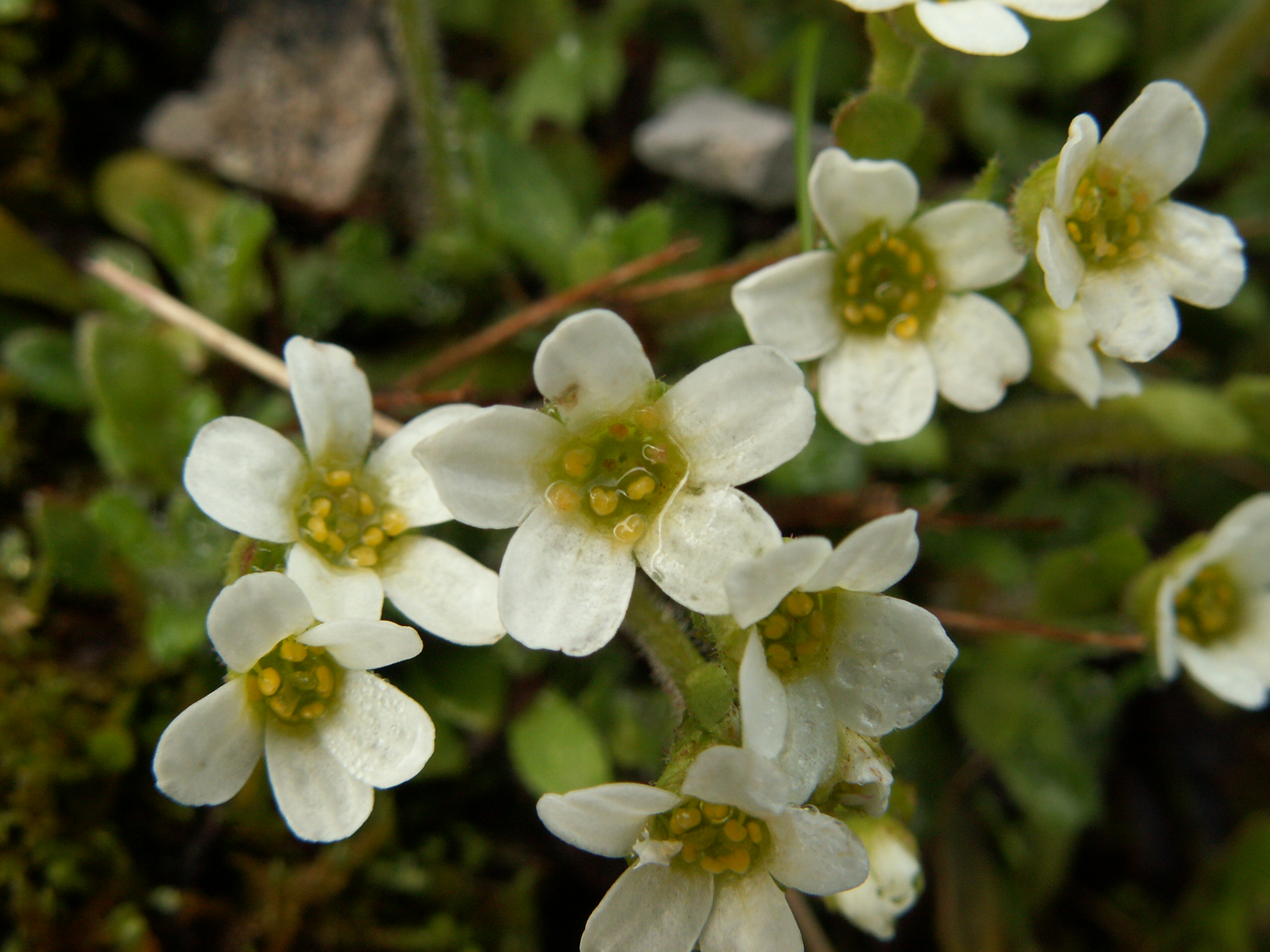 Saxifraga androsace, Schynige Platte, Kanton Bern, Schweiz